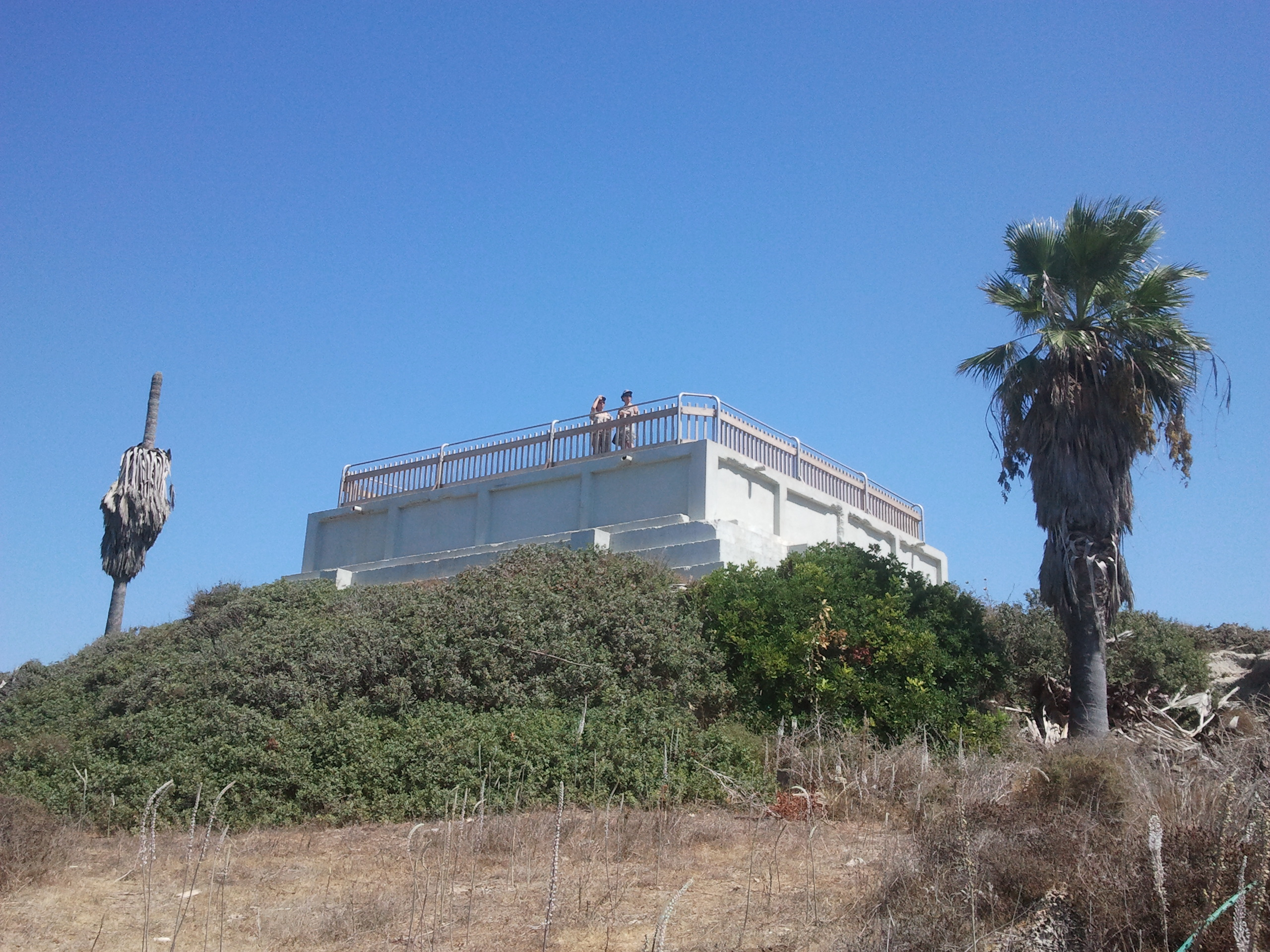 שמורת טבע חורבת קרתא, שוכנת במישור חוף הכרמל ליד עתלית תצפית ברכת המים